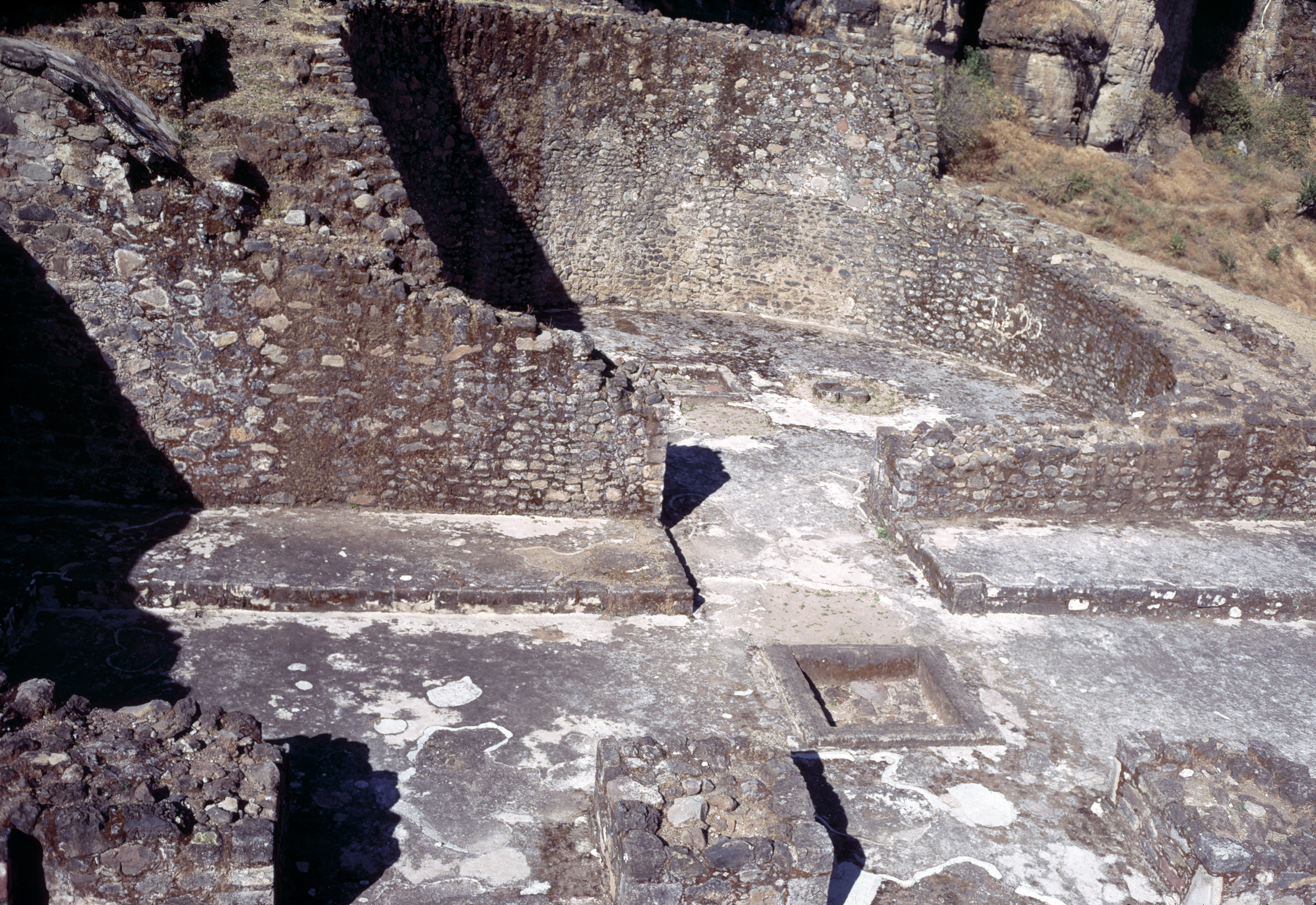 Malinalco, Estado de México, Mexiko: Gebäude 3